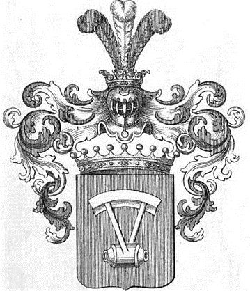 Erb rodu Lažanských z Bukové